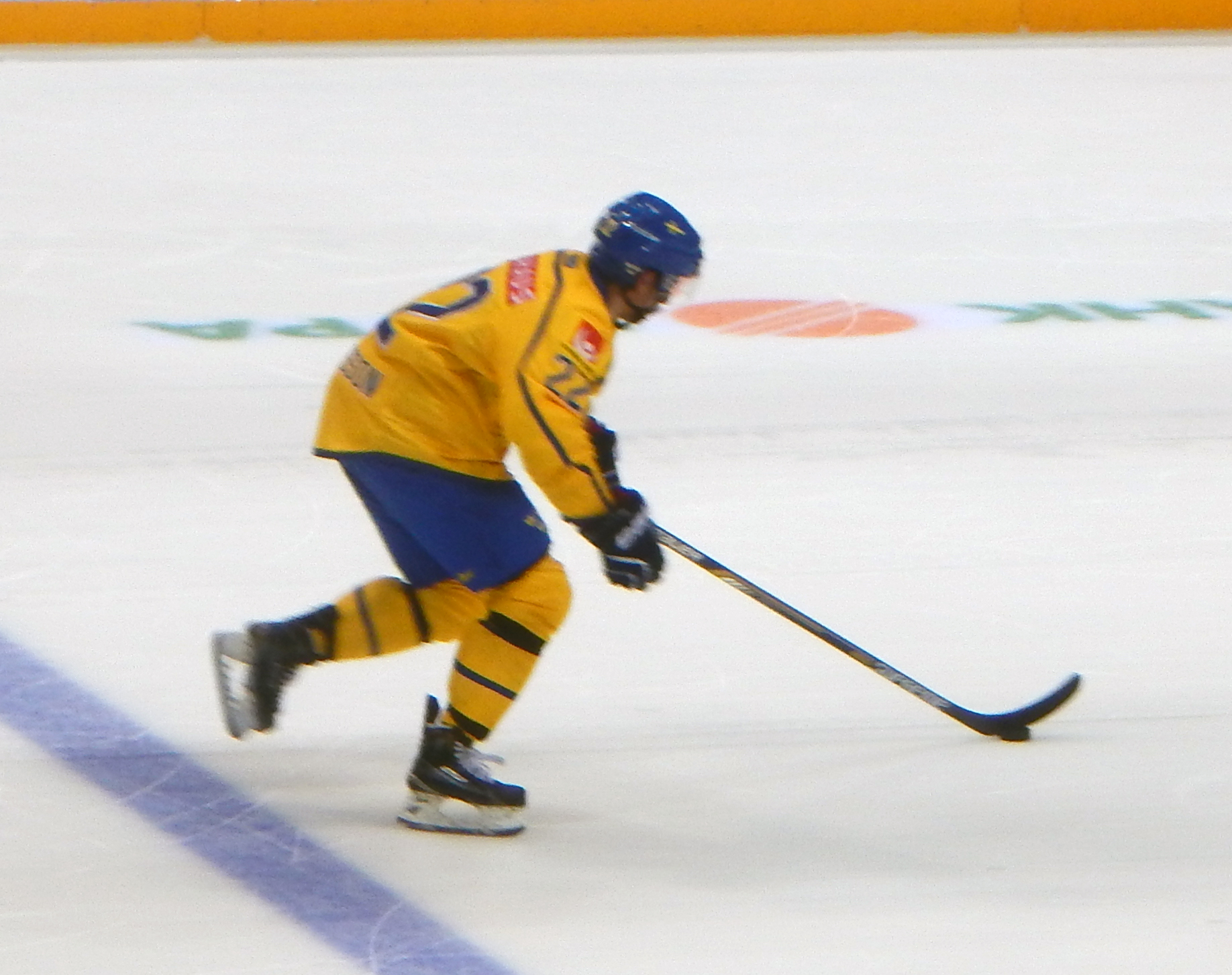 Андре Петерссон готовится исполнить послематчевый буллит в матче на Кубке Первого Канала против Финляндии